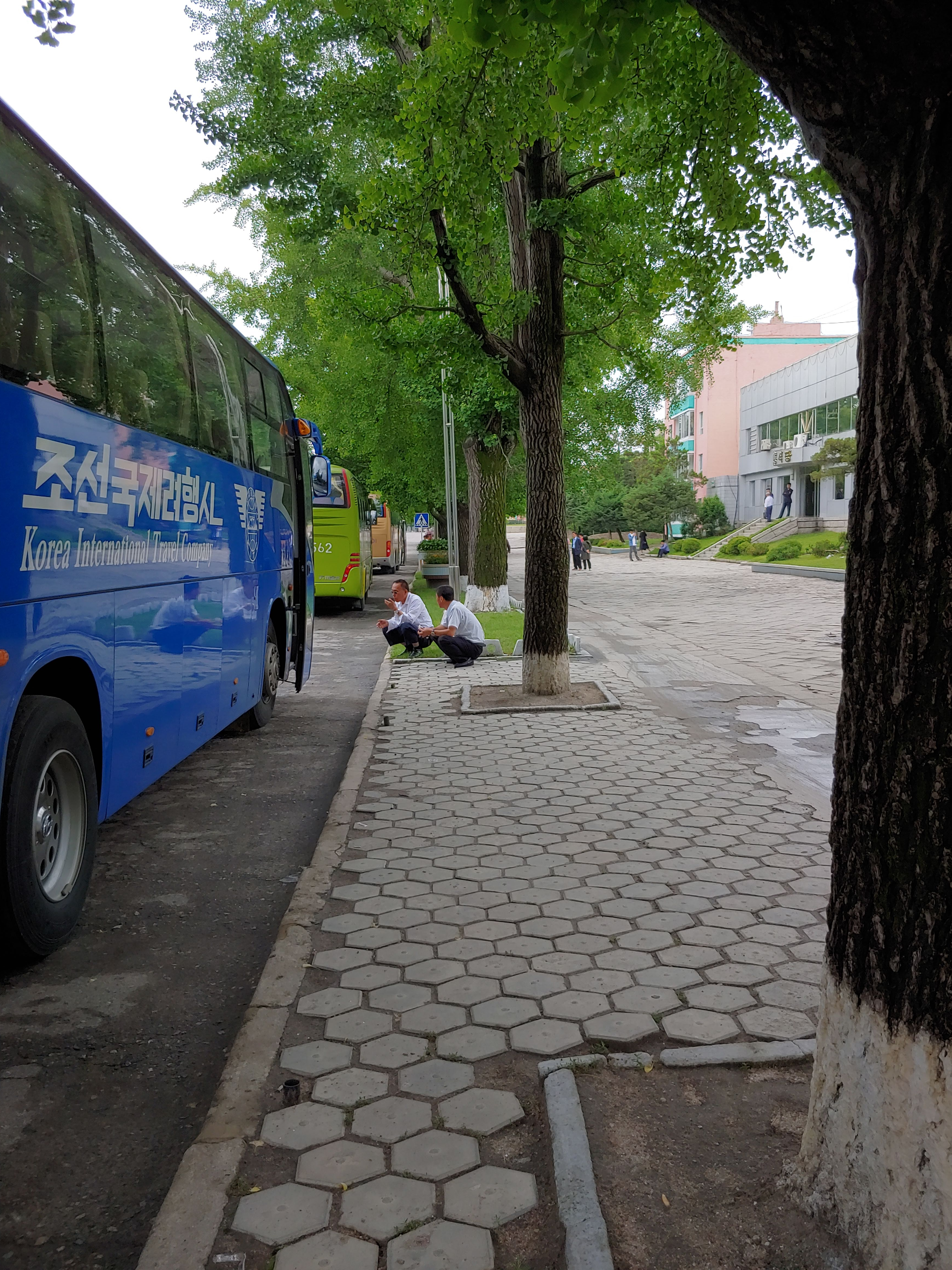 Bus touristique iconique appartenant à la Korea International Travel Company